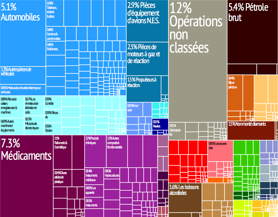 Représentation graphique des exportations de produits du pays dans 28 catégories de couleur. Chaque case de couleur représente un produit et sa taille est proportionnelle à la part des exportations totales du pays que le produit représente.